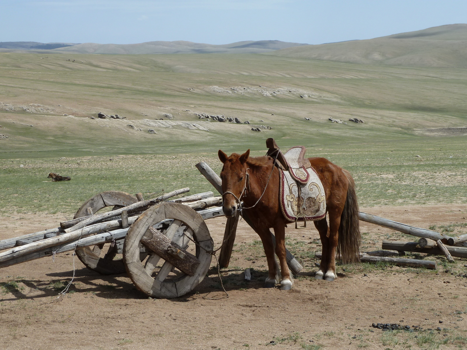 Arkhust, Mongolia